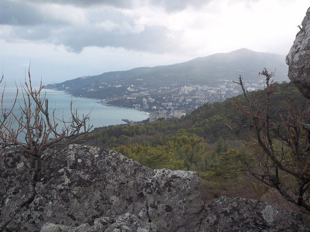 Вид на Ялту с Массандровского леса